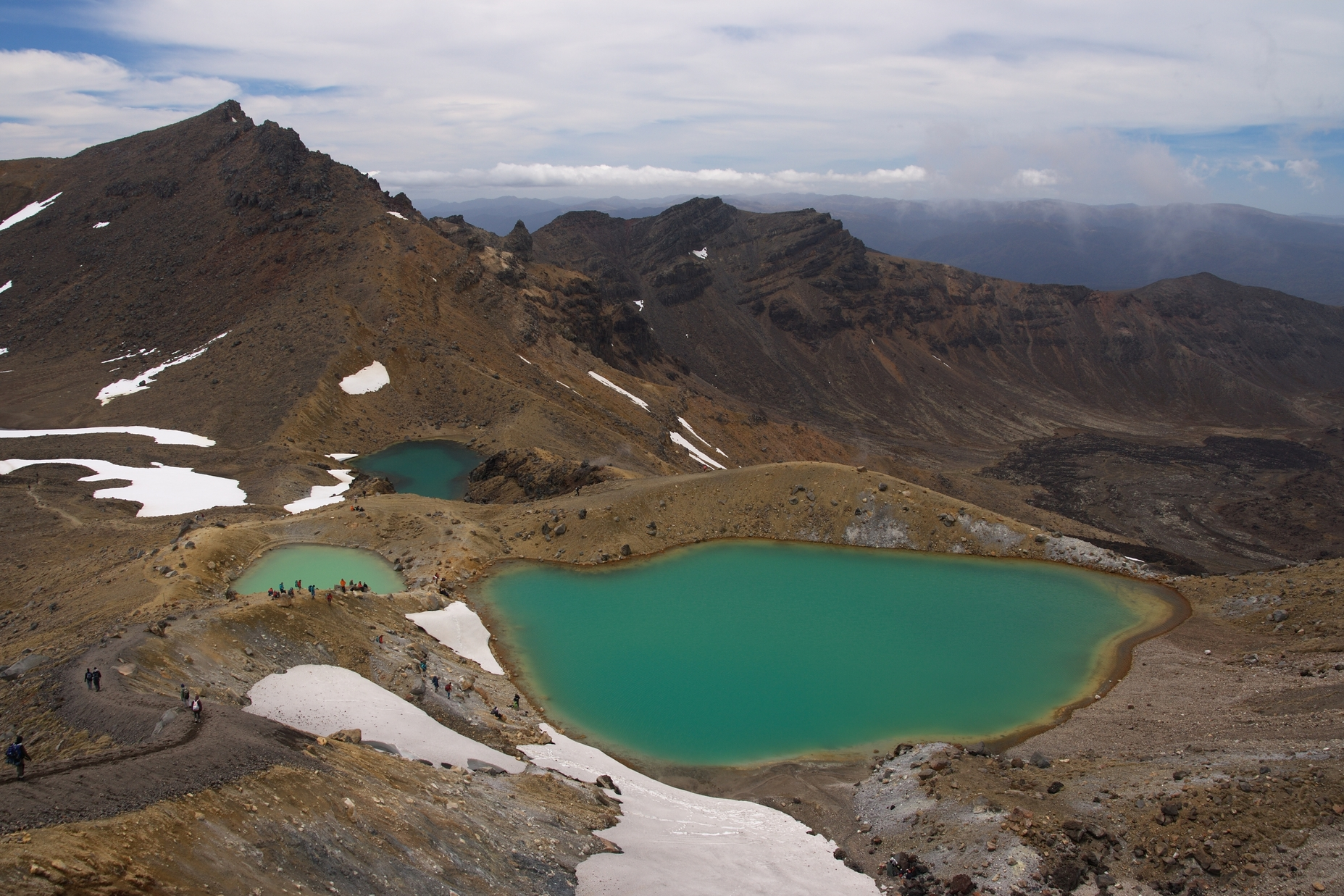 Emerald Lakes